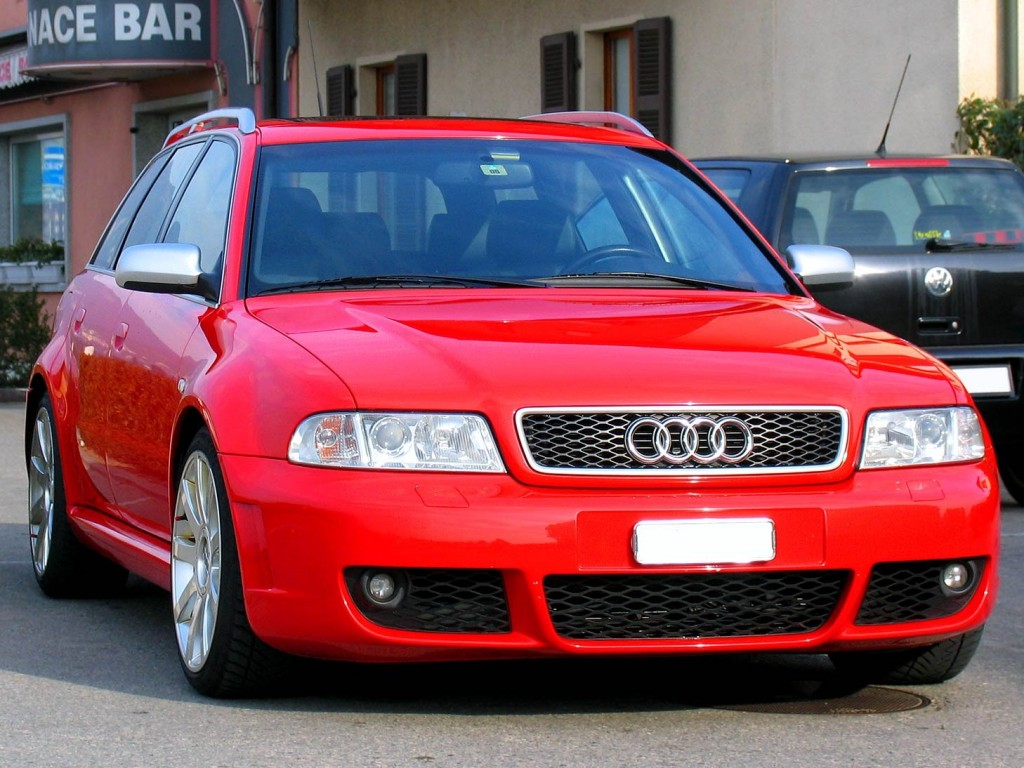 Audi RS4 Avant (Modell B5), misanorot